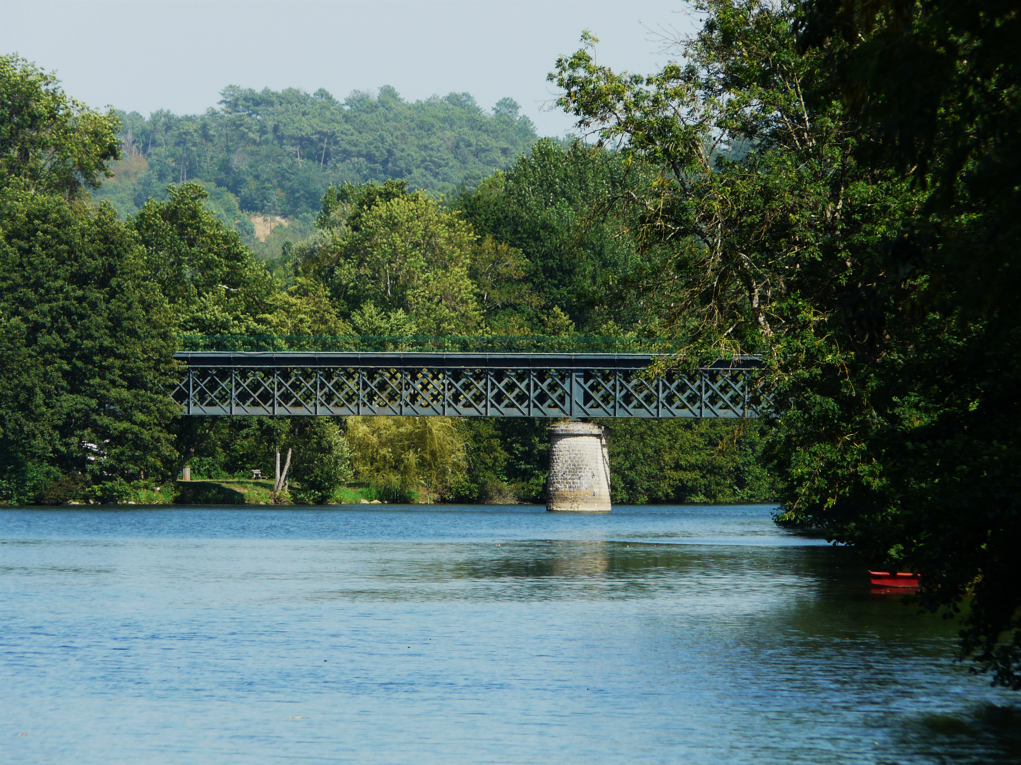 Vu depuis la Caillade, le pont de la route départementale 3E5 sur l'Isle, entre Saint-Louis-en-l'Isle (à gauche) et Sourzac (à droite), Dordogne, France. Vue prise en direction de l'amont.